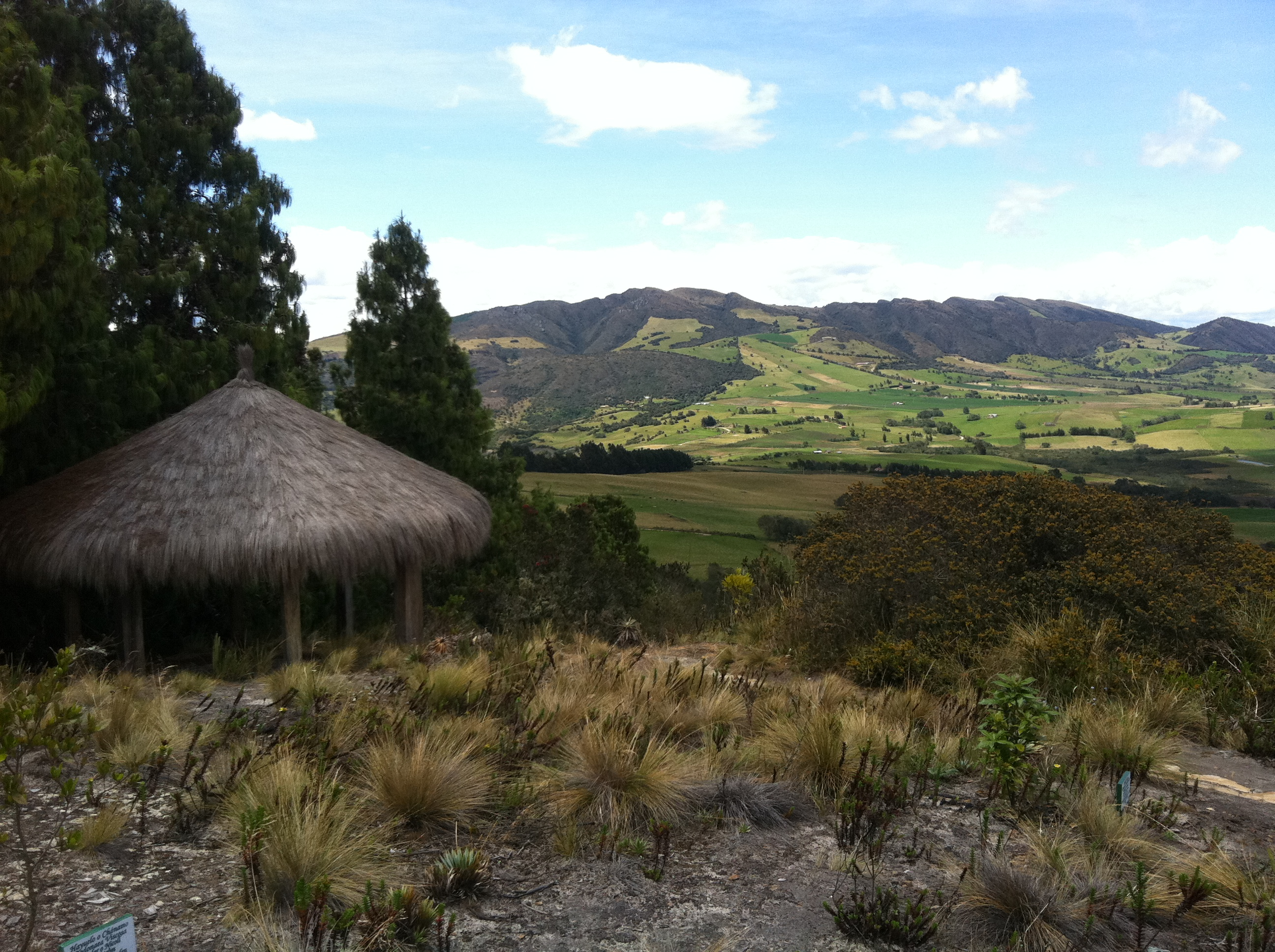 Sesquilé, Cundinamarca, Colombia